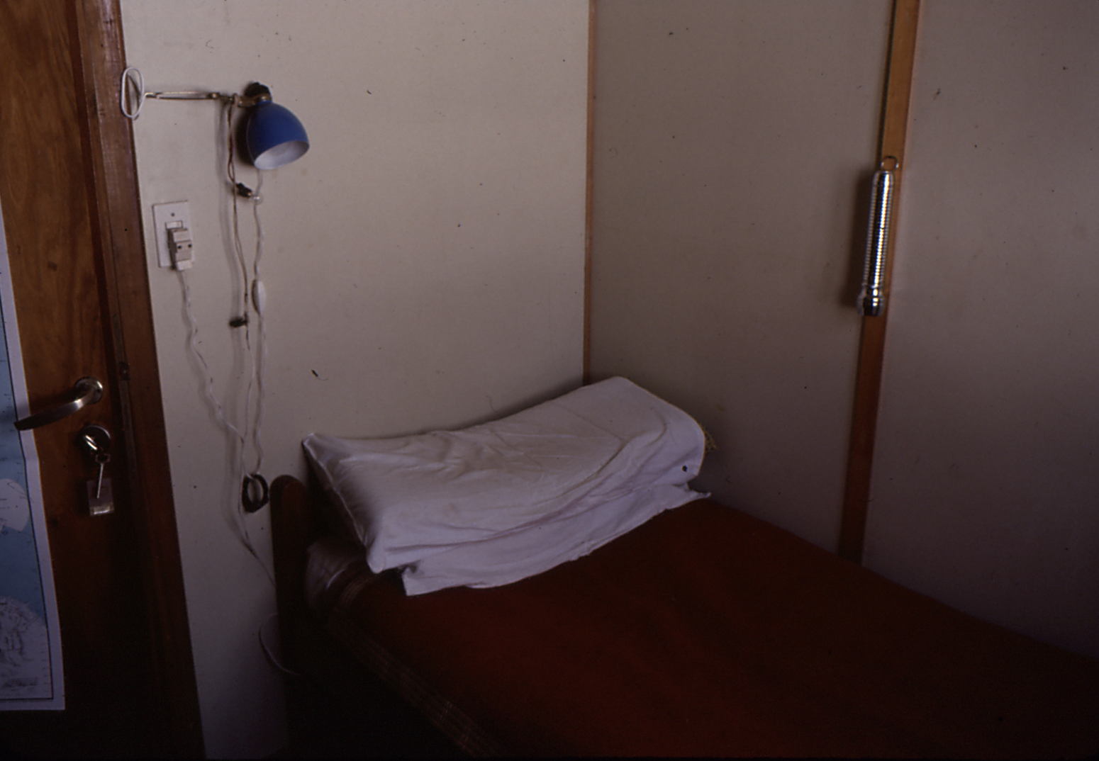 Habitación de la Base Carlini, en ese momento Jubany, en 1984.